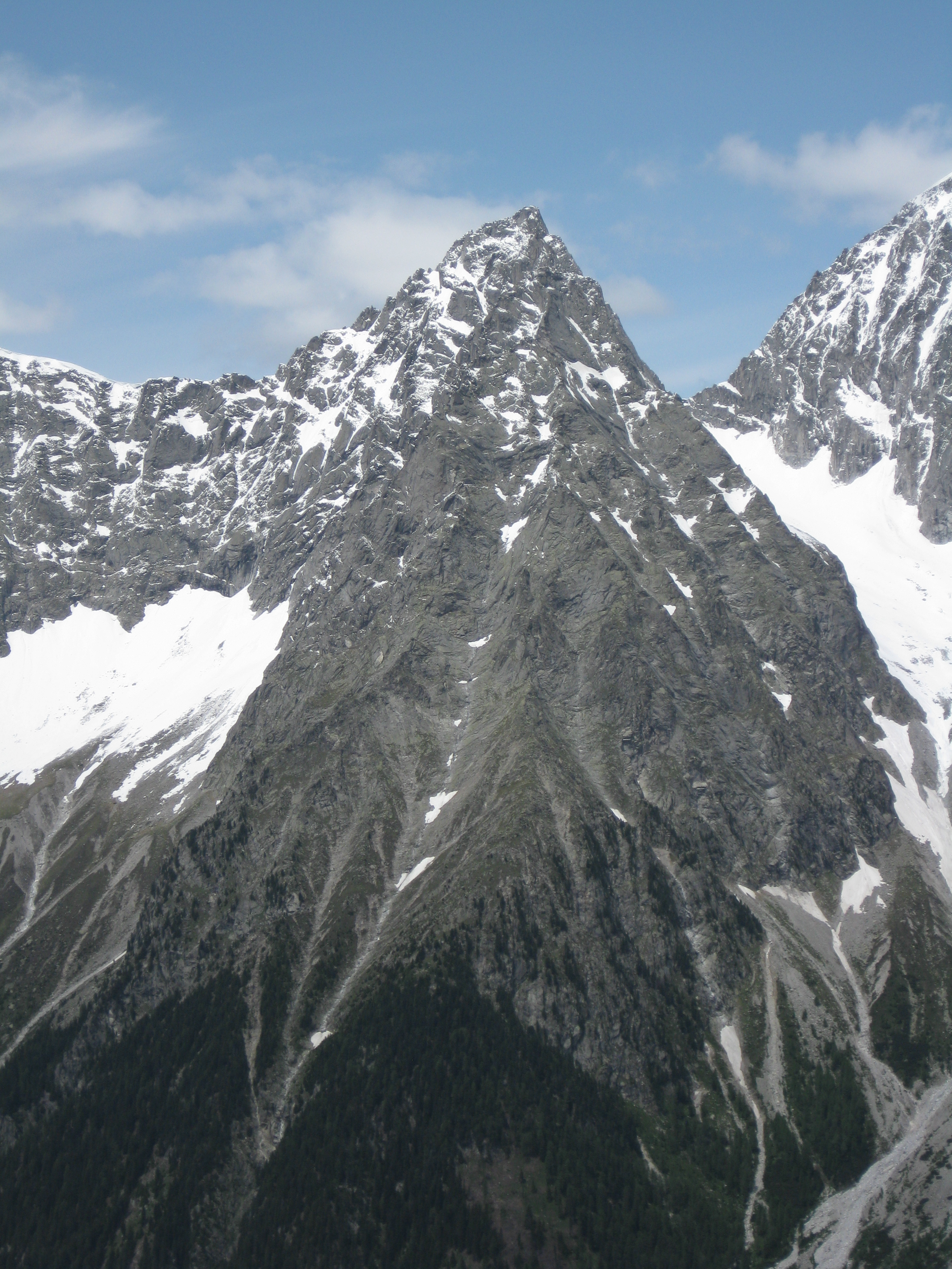 Wildgall von Südost vom Gipfel der Roten Wand